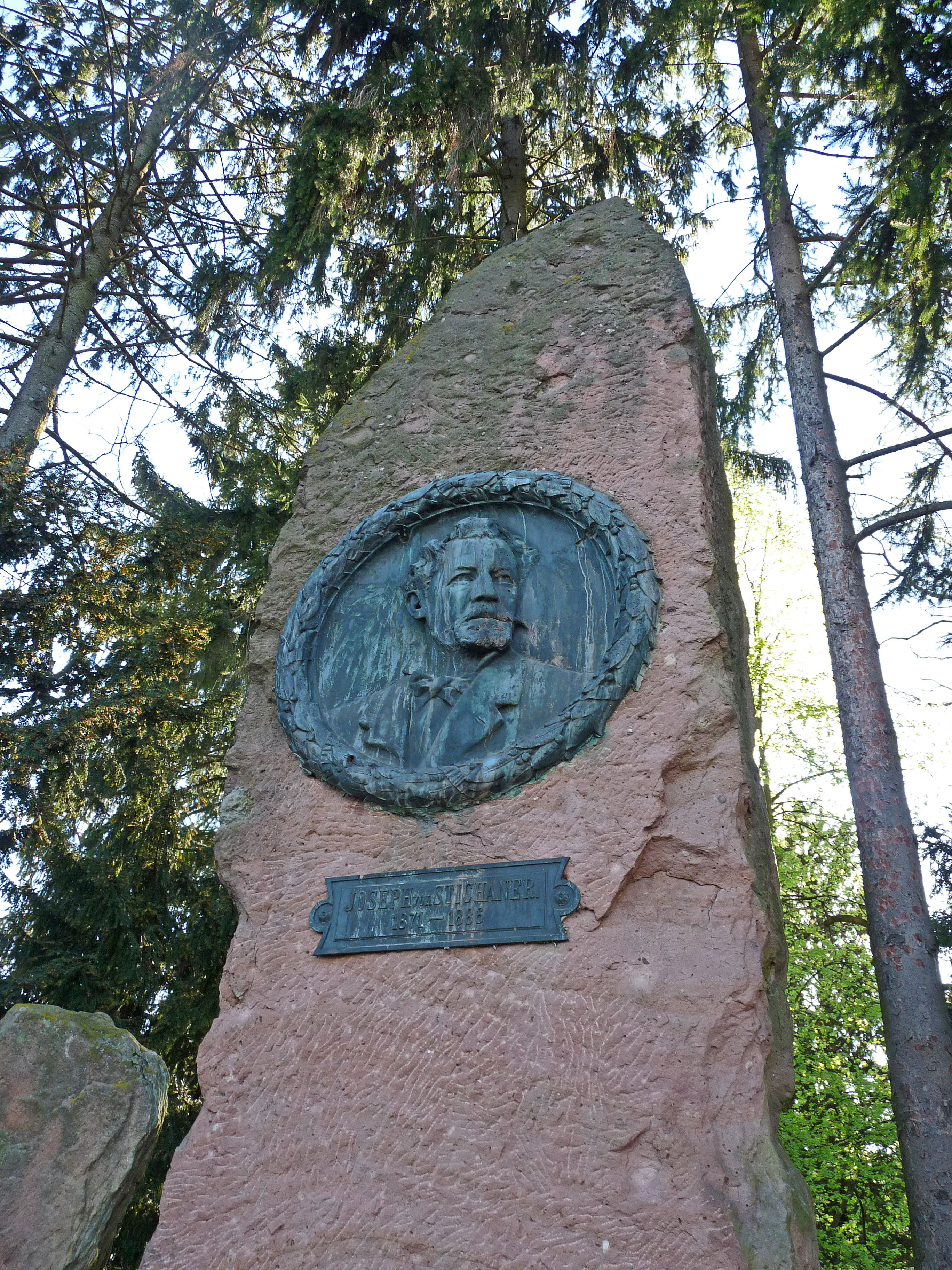 Wissembourg (Bas-Rhin) : fontaine dédiée à Joseph von Stichaner, qui fut Kreisdirektor de Wissembourg de 1871 à 1886